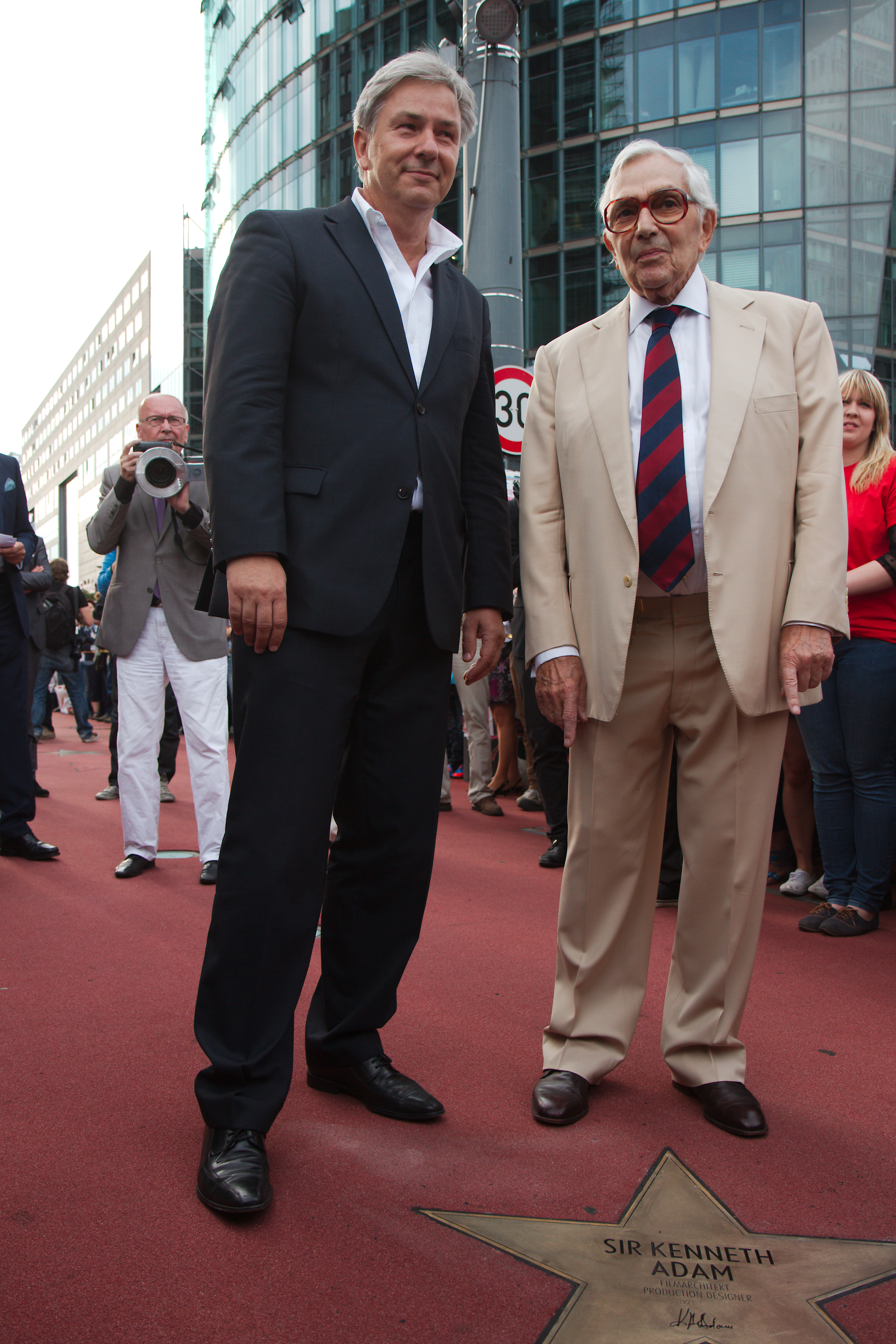 Daneben Bürgermeister Wowereit